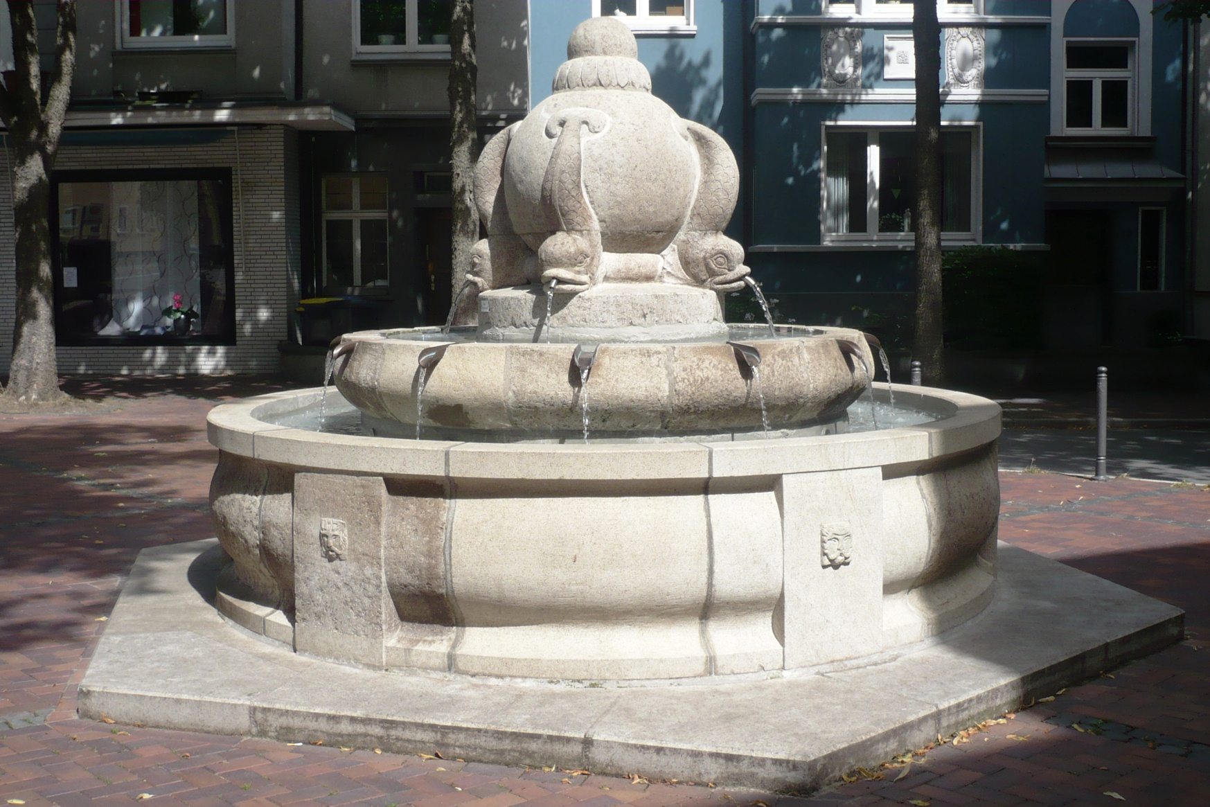 Gänsereiterbrunnen in Essen-Frohnhausen